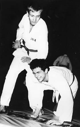 Нiккё-осаэ ў айкідо – адна з пачатковых тэхнiк.